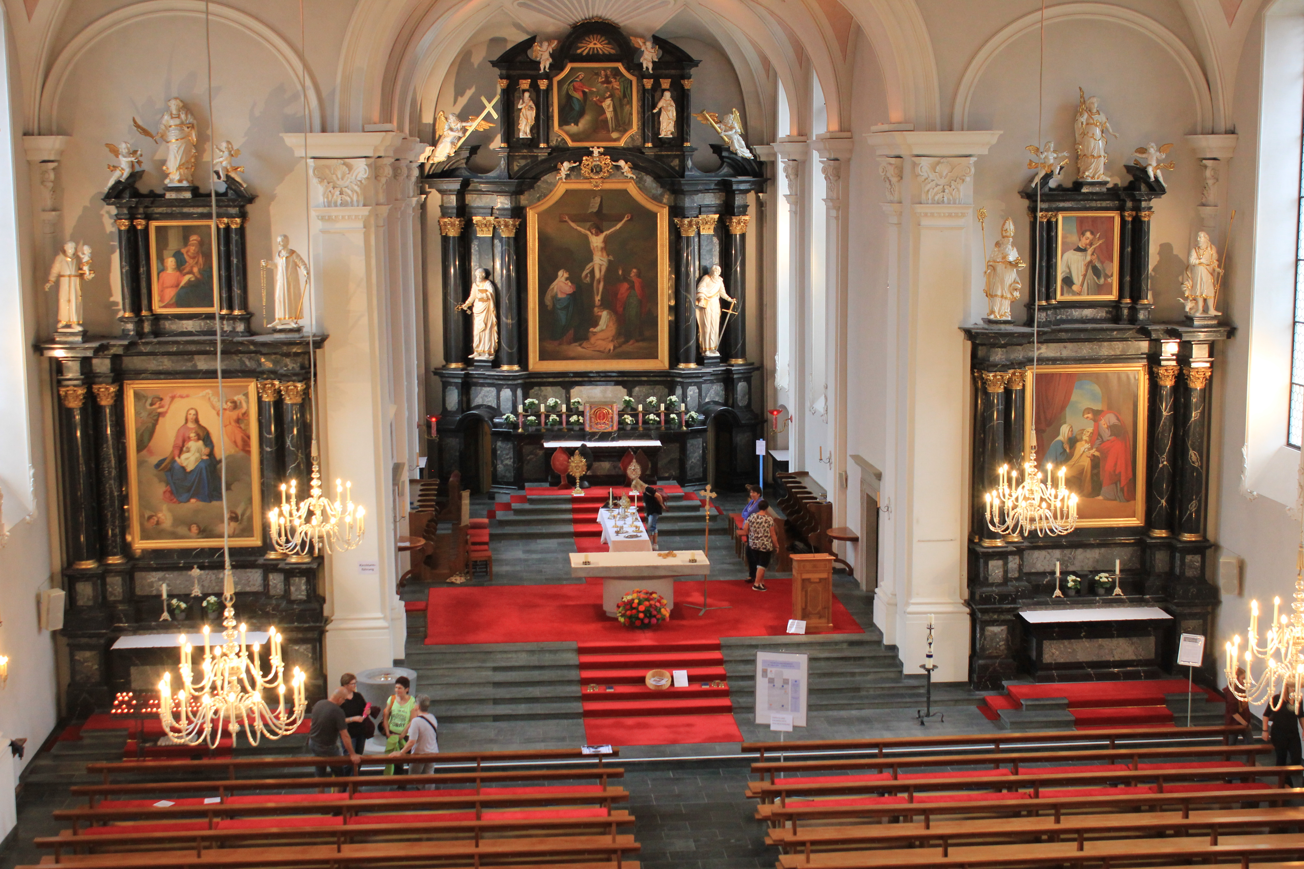 Chor und Seitenaltäre in der Pfarrkirche St. Peter und Paul, Küssnacht SZ, fotografiert von der Orgelempore.